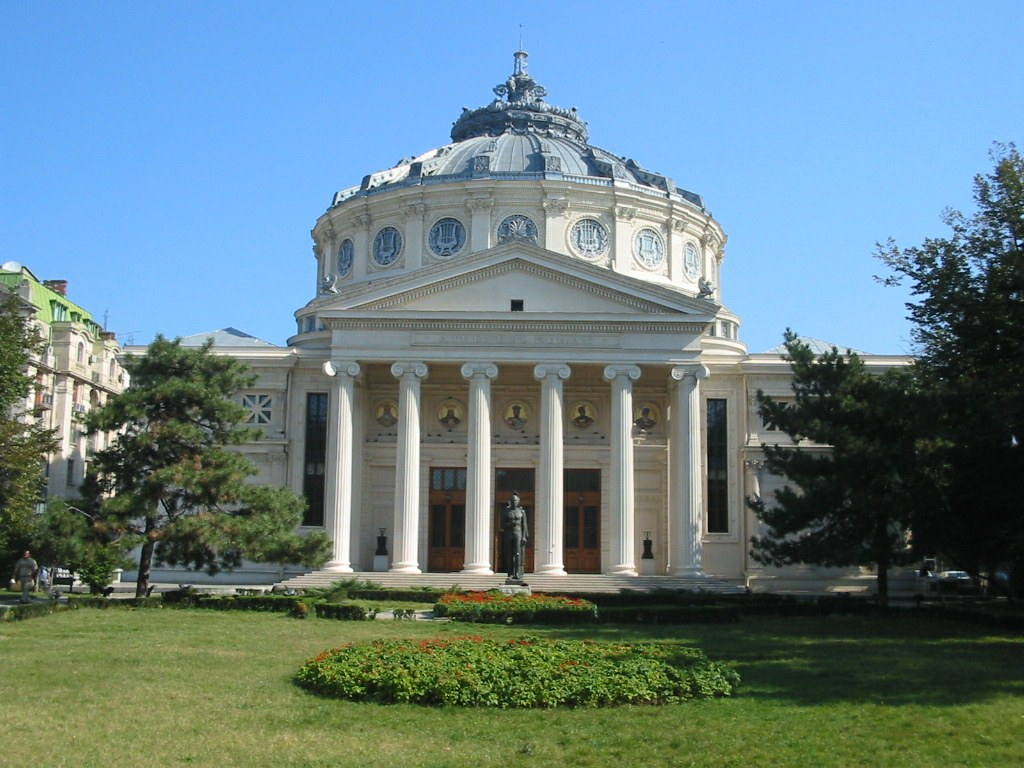 Bucharest, Romania: Ateneu Român